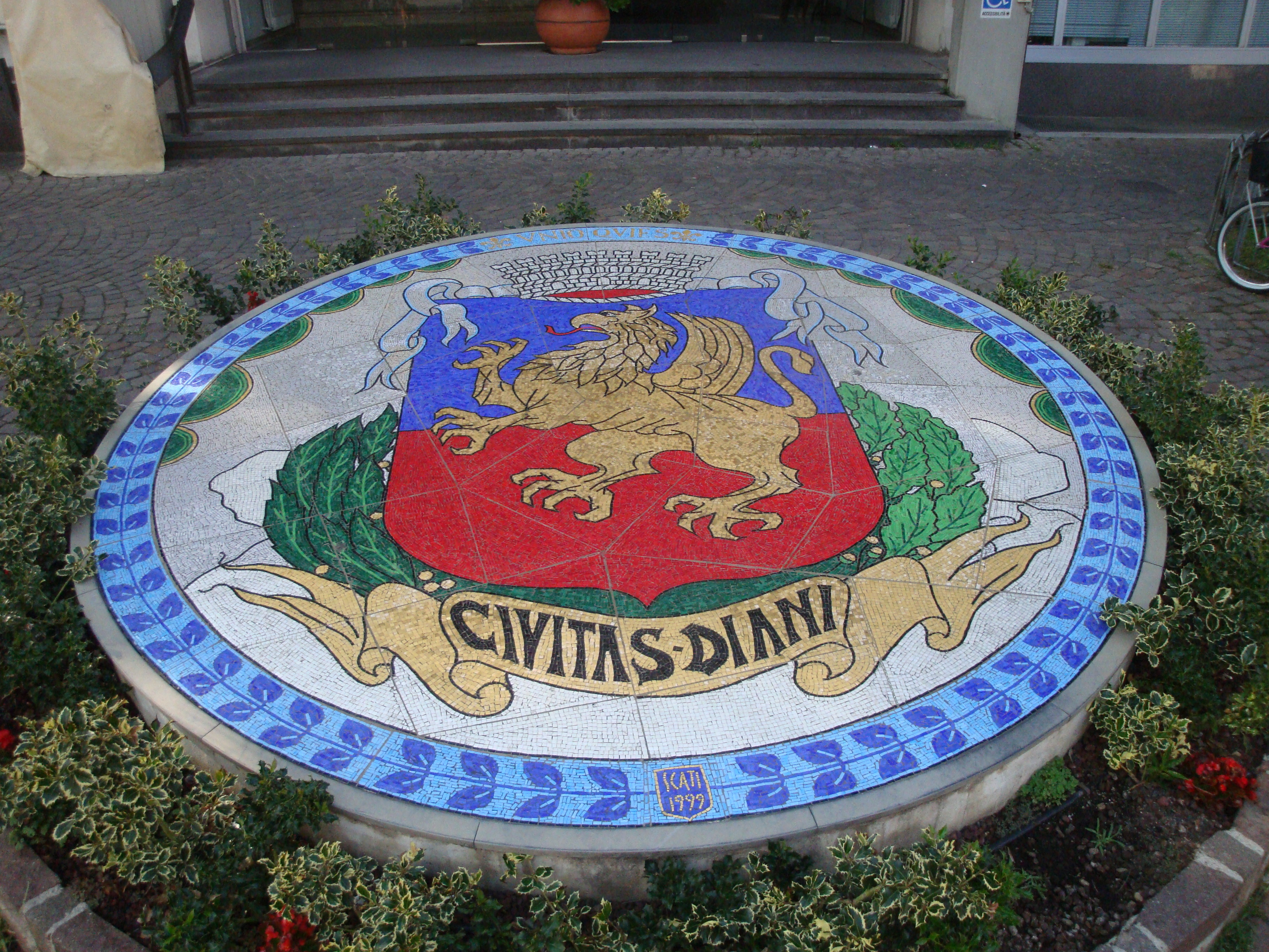 Autore: Tony Frisina - Alessandria